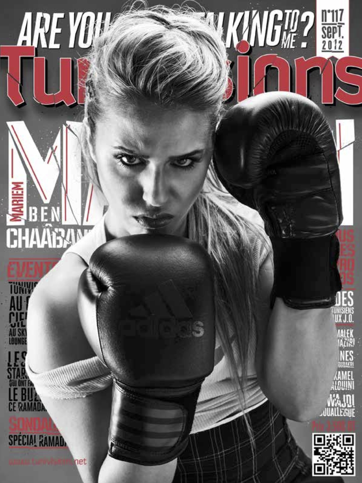 Couverture du numéro 117 du magazine tunisien Tunivisions.